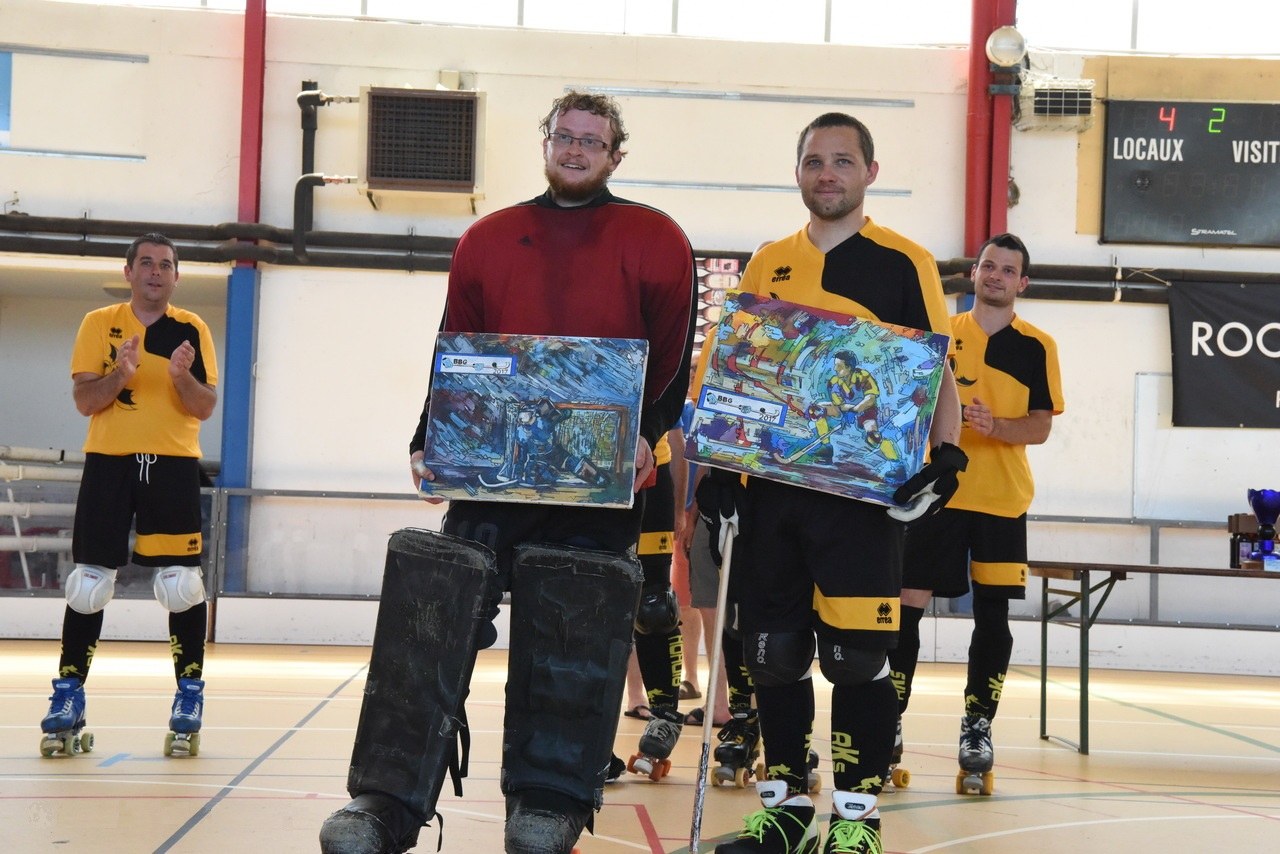 Un gardien et un joueur de rink hockey sont primés